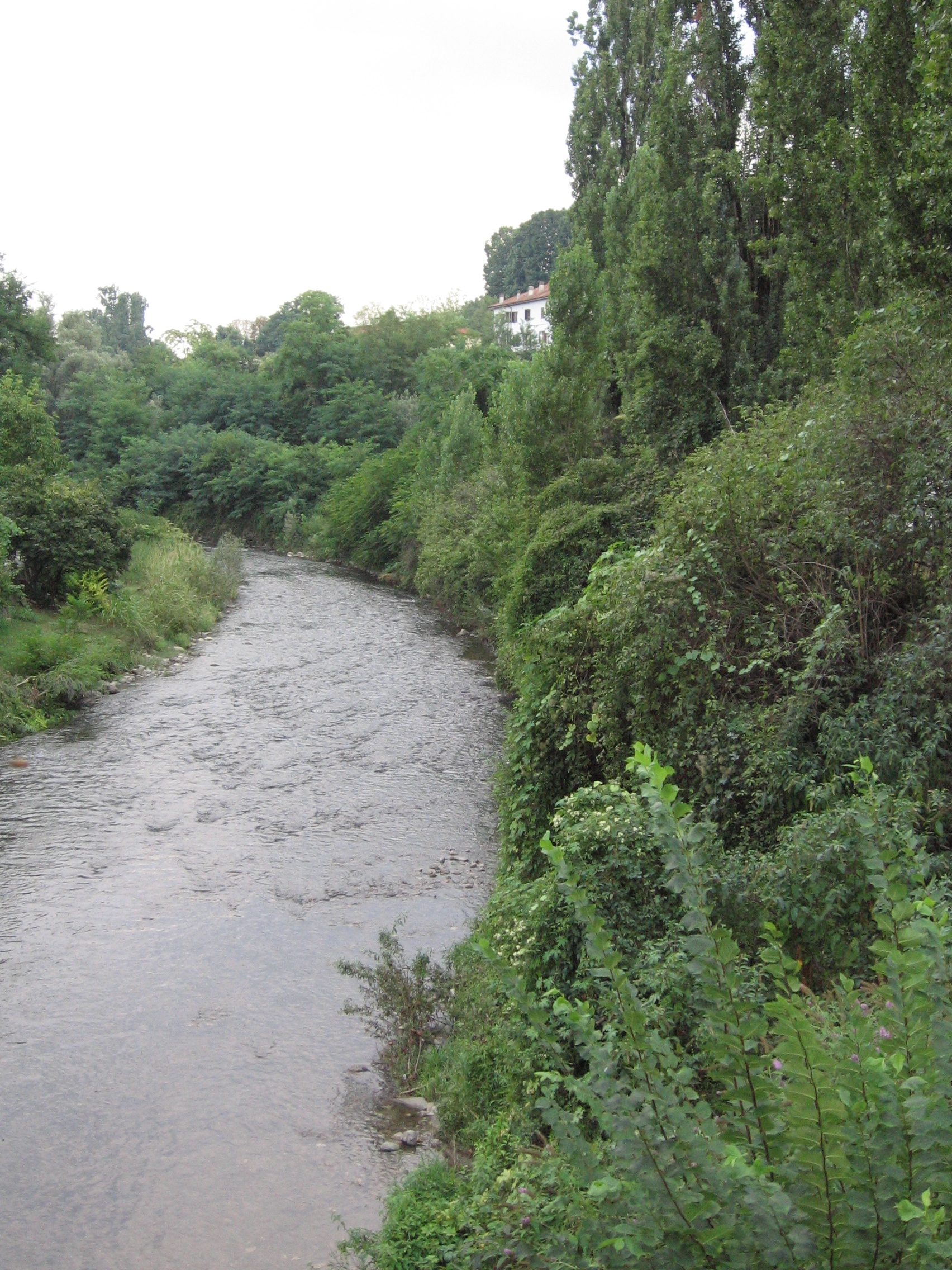 Il fiume Lambro a Ponte di Triuggio Ul fiümm Lambar al Punt da Triücc Lambro river in Ponte di Triuggio